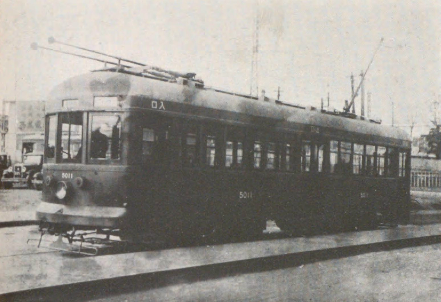 東京市電時代の5000形電車。おそらく就役直後に撮影されたもの。